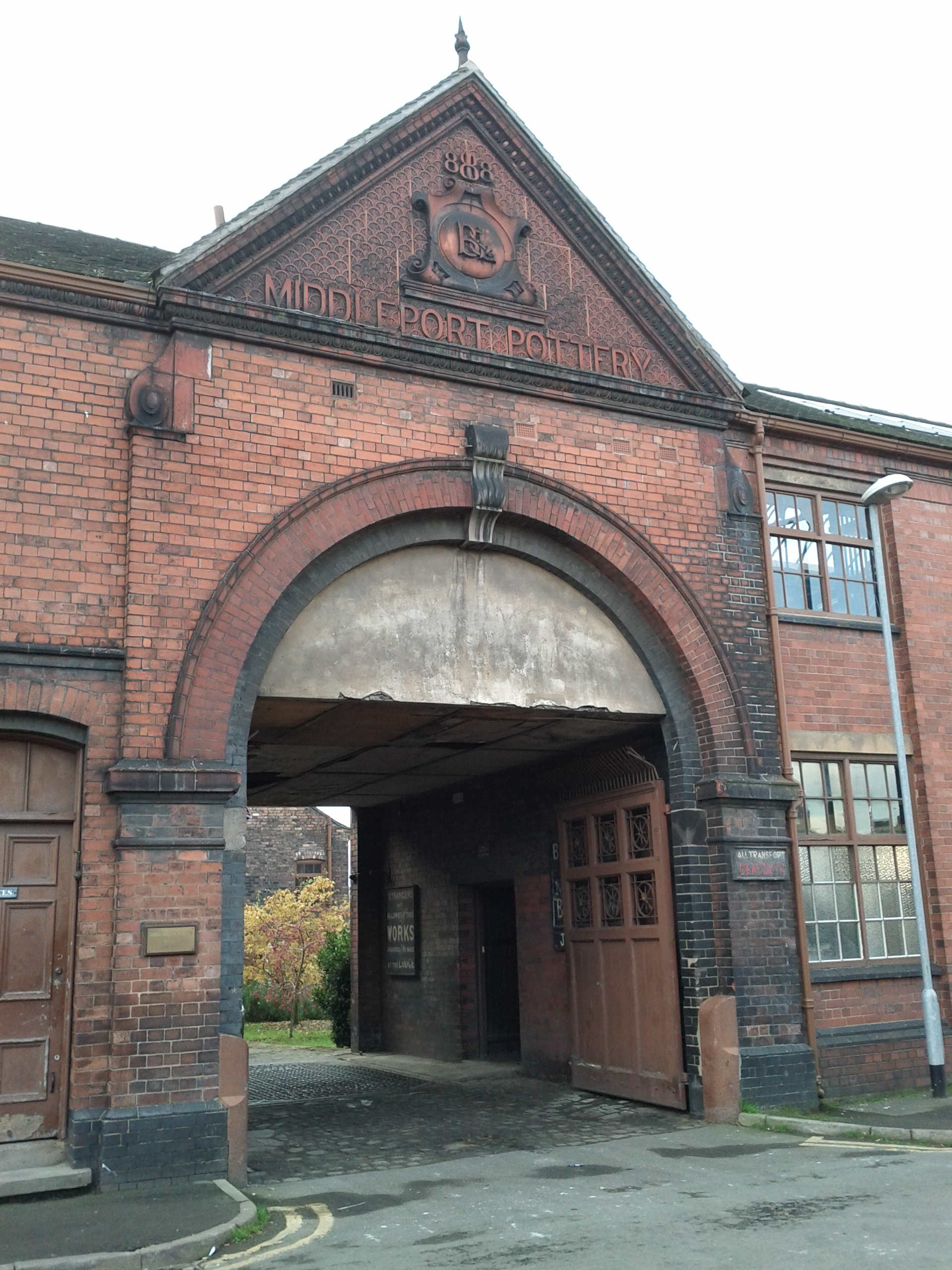 Middleport Pottery